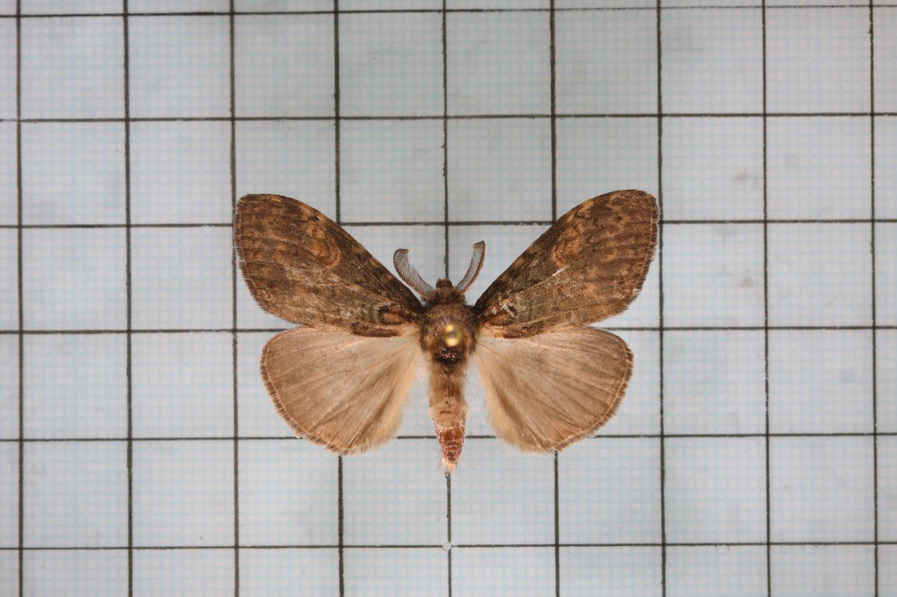 Olene dudgeoni Swinhoe male 桃毒蛾 鞍2:P.123,Pl.52-10,11